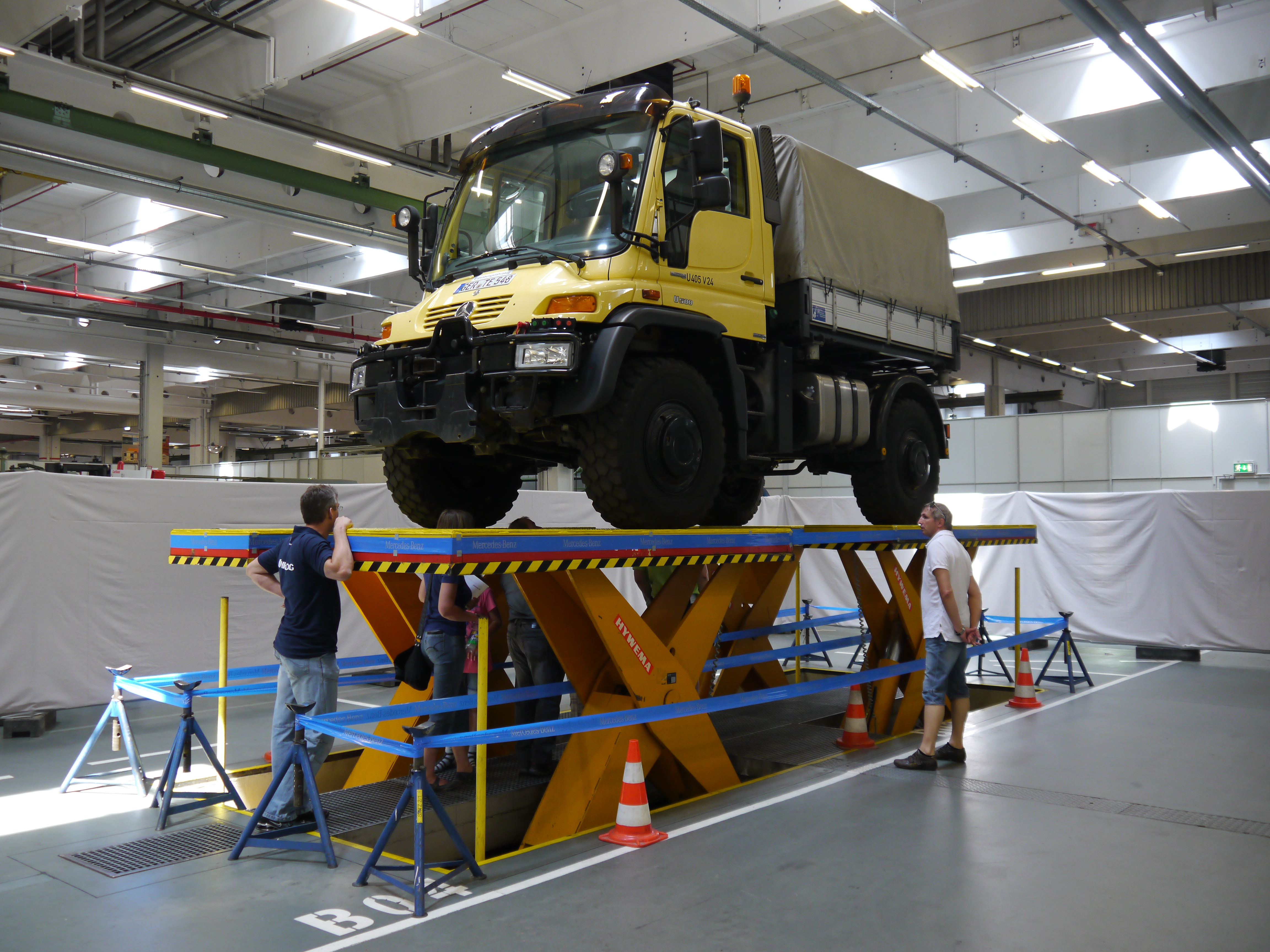 60 Jahre Unimog - Wörth 2011 317 Entwicklungswerkstatt.